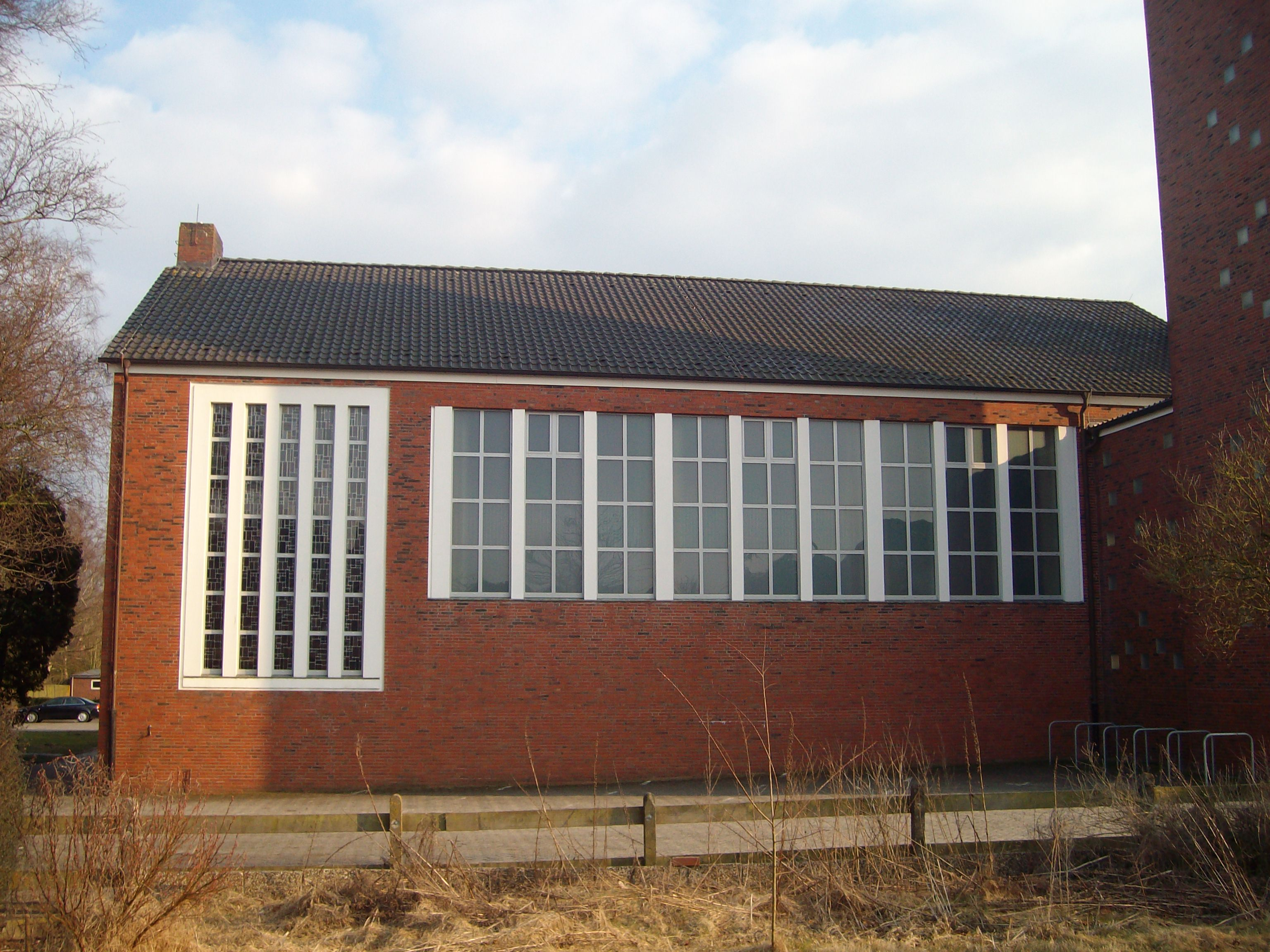 Evangelisch-altreformierte Kirche Bunde, Ostfriesland, Niedersachsen, Deutschland